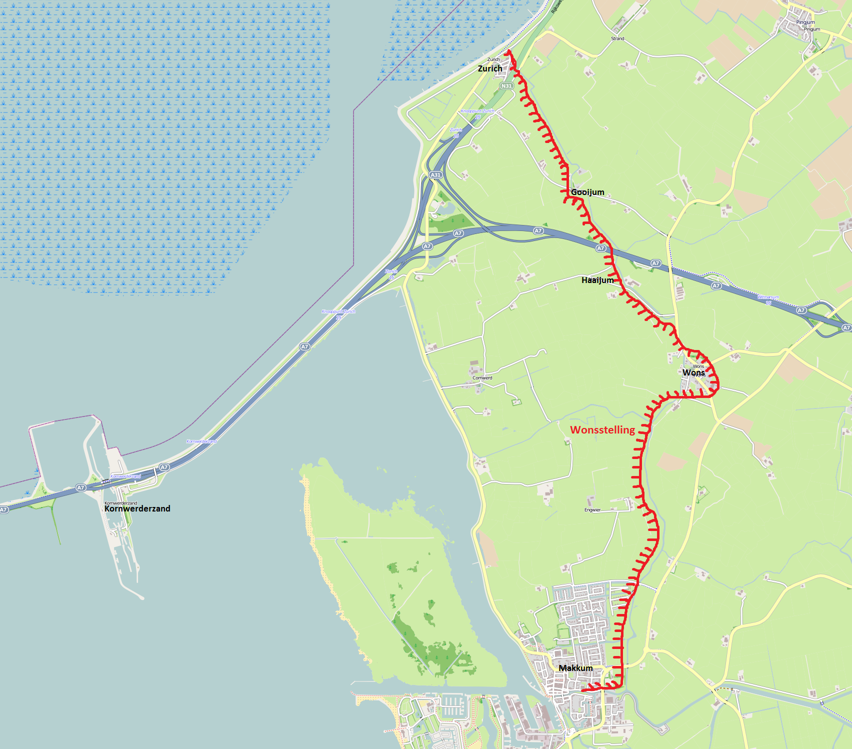 Wonsstelling